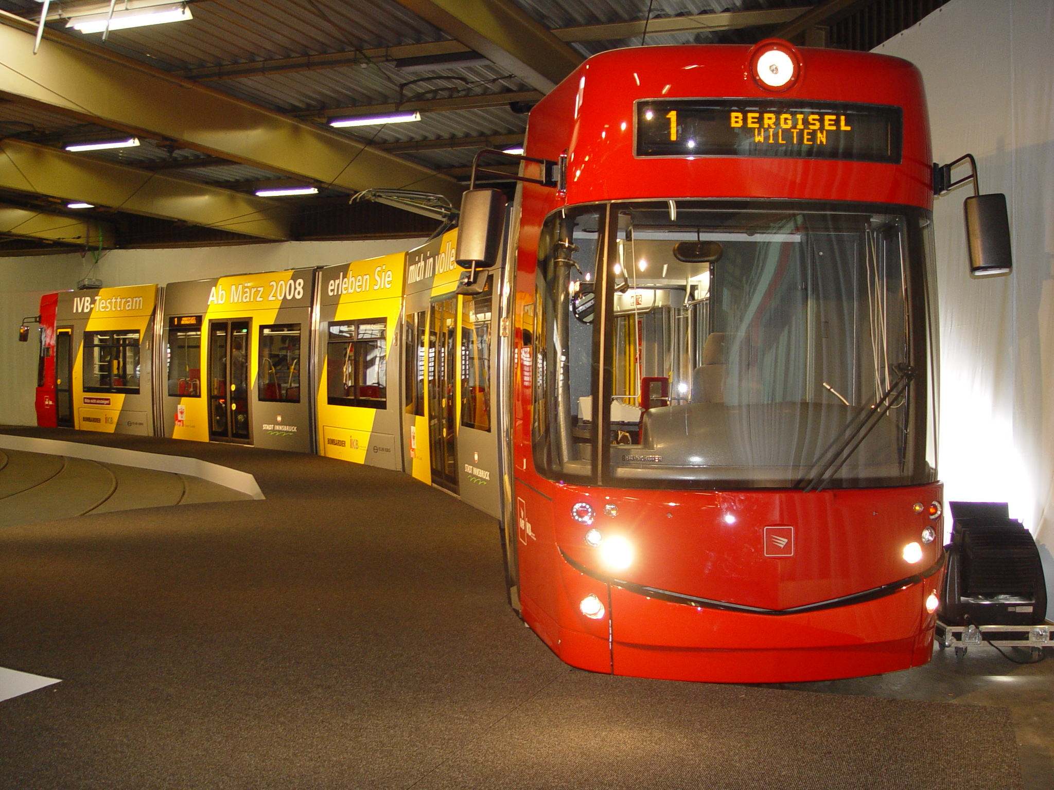 Triebwagen 351 der Innsbrucker Verkehrsbetriebe 3 Tage nach der Anlieferung im Design für die Testfahrten